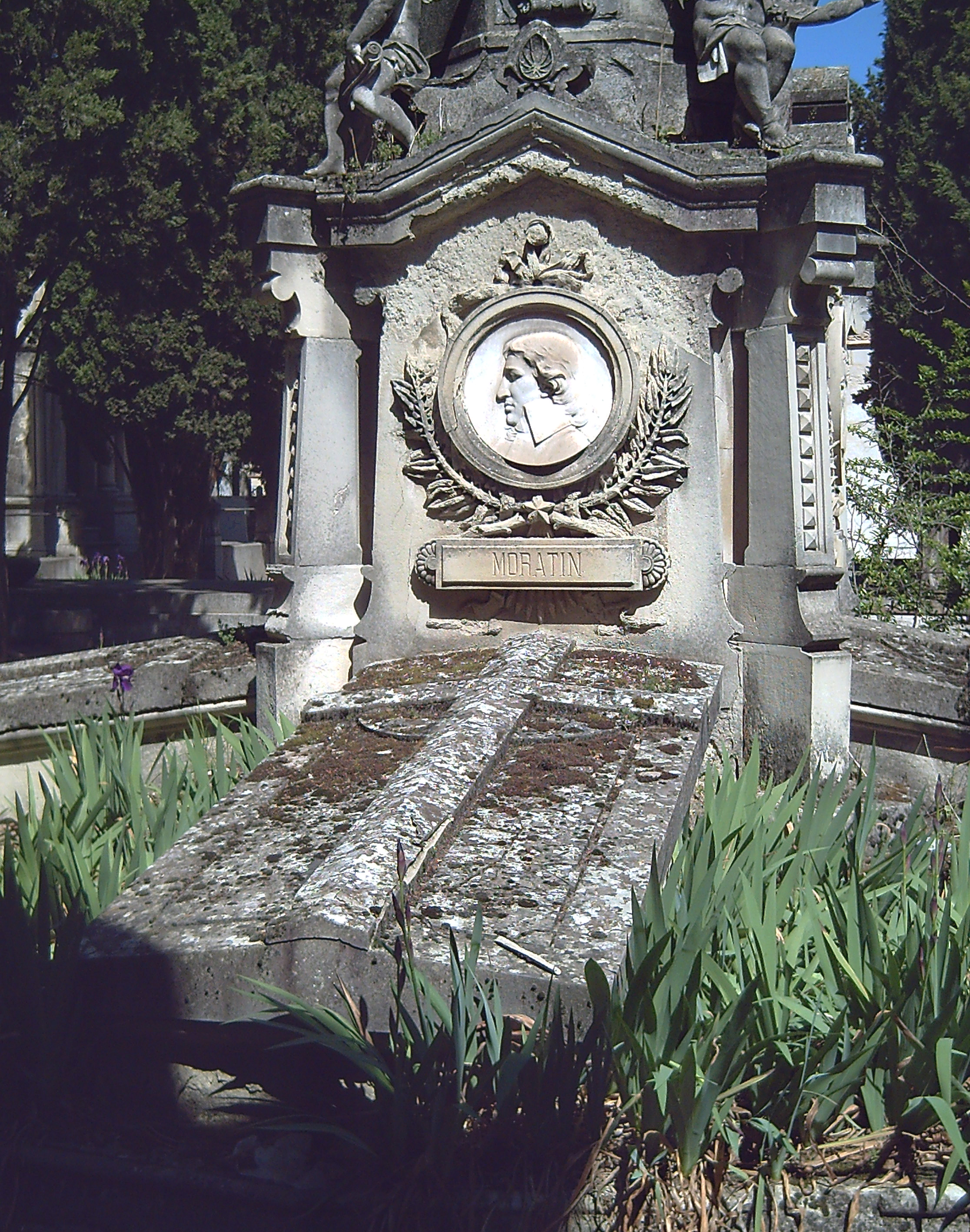 Tomb of Leandro Fernández de Moratín.